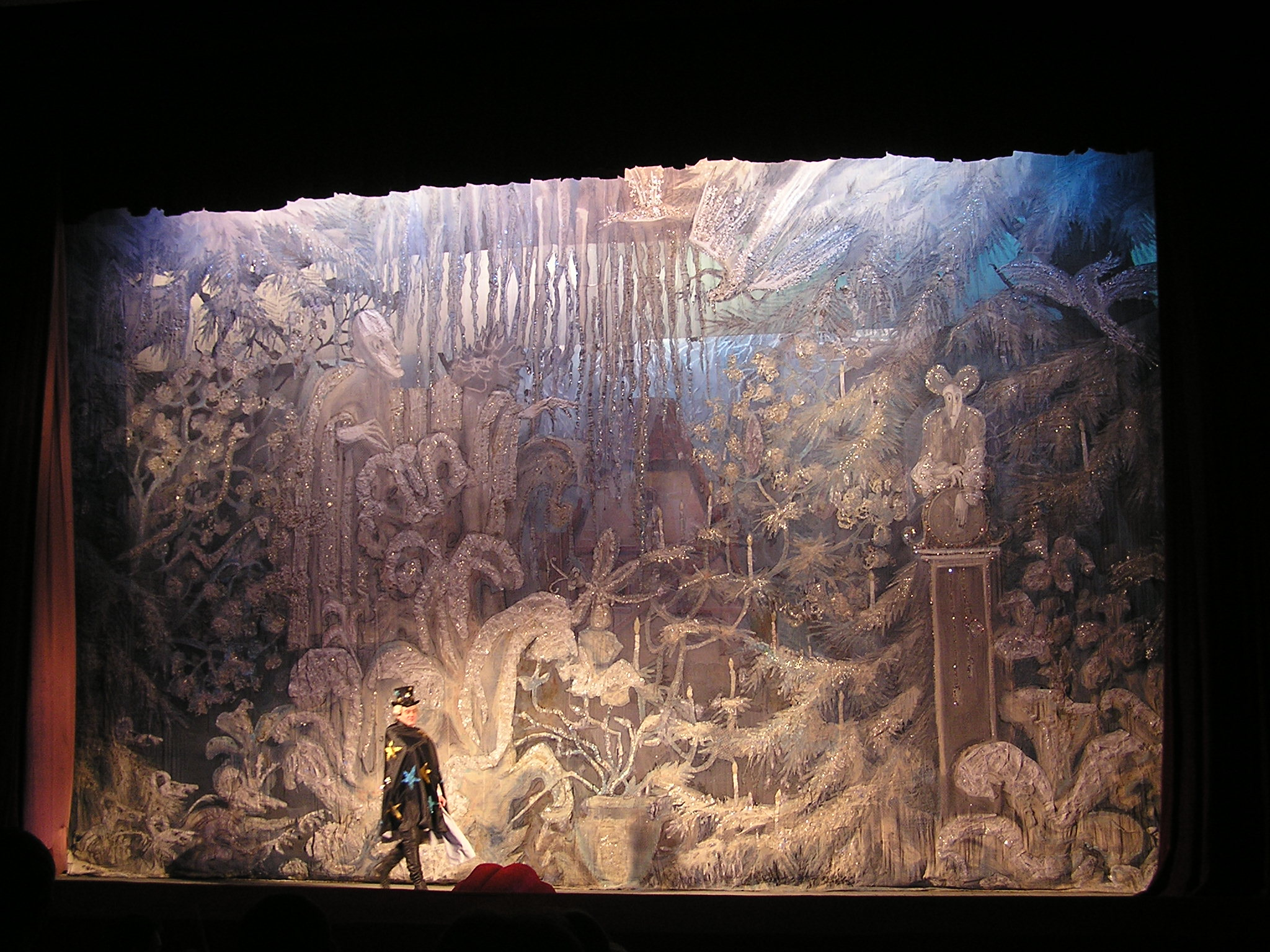 Донецкий театр оперы и балета. Постановка «Золушки» А. Спадавеккиа. Лес.